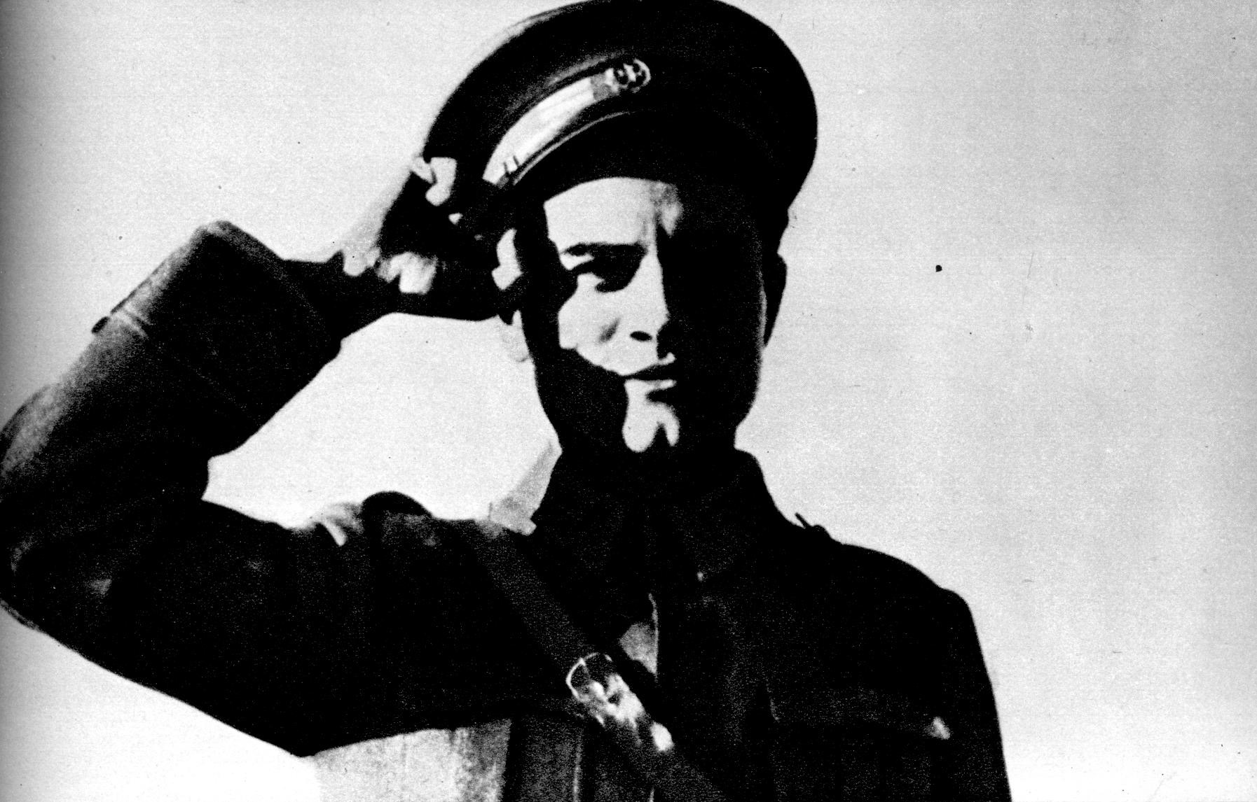 Gojko Nikoliš, Jugosloven-lekar u Španiji.